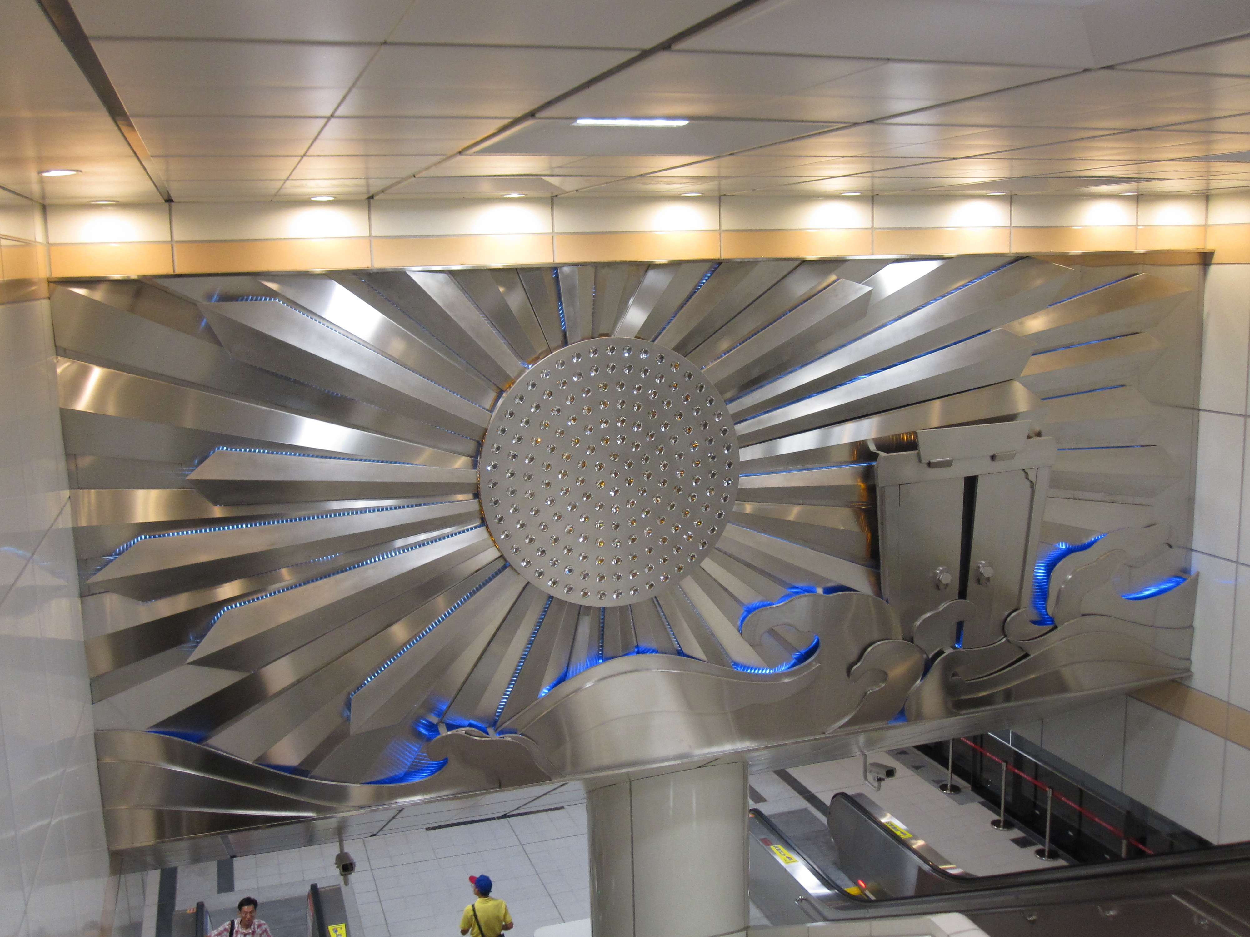 中文（台灣）: 台北捷運東門站公共藝術。